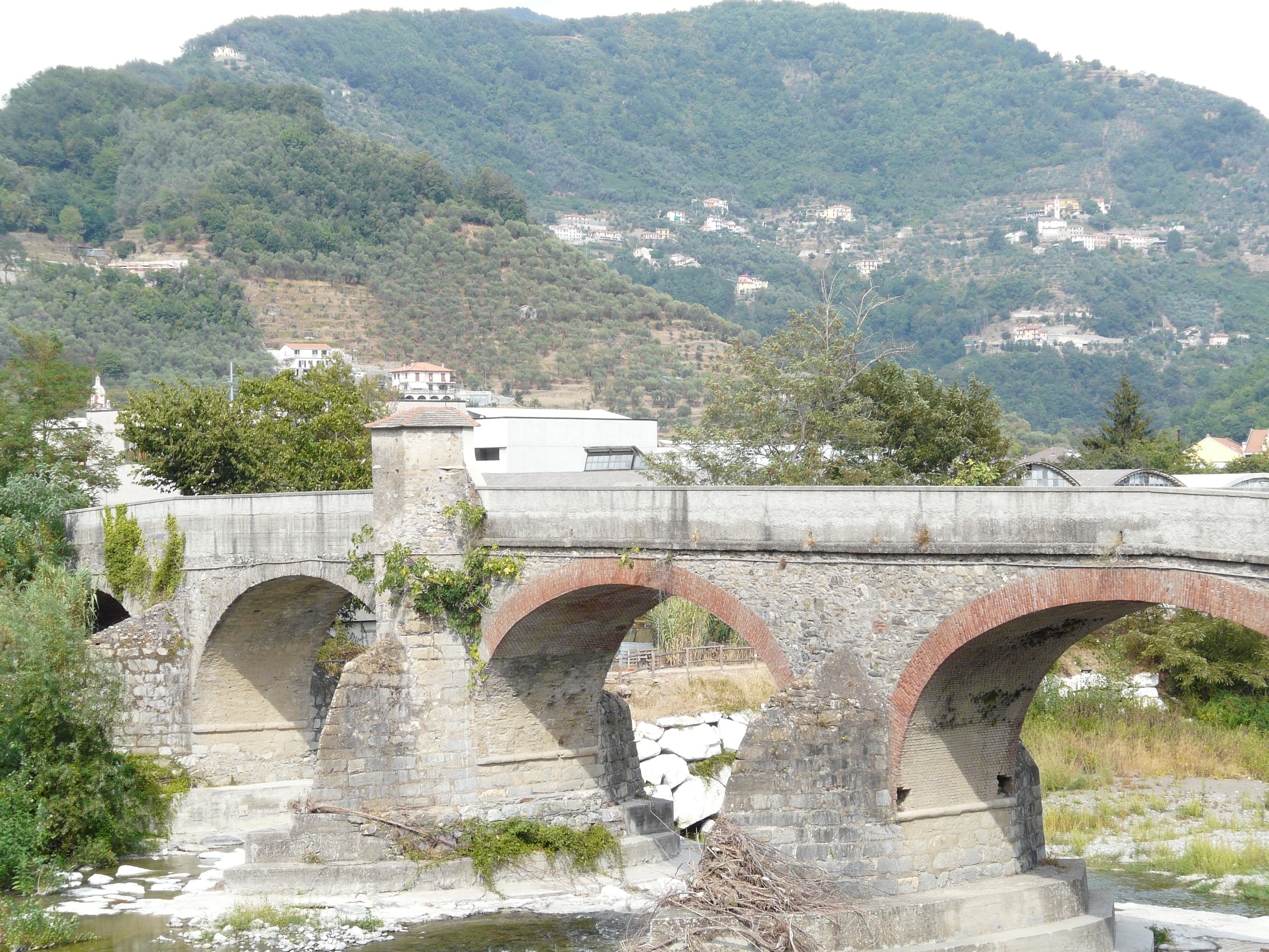 Ponte di Carasco, Liguria, Italia